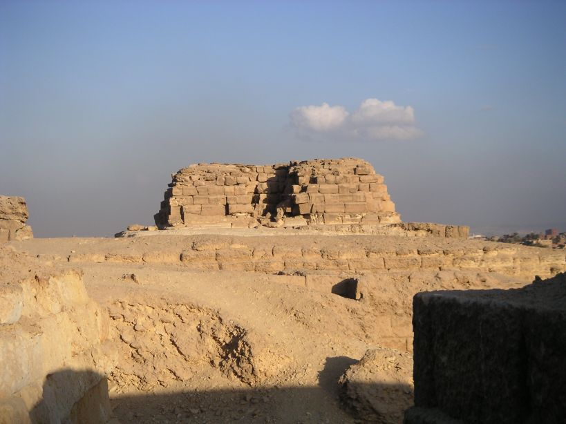 Vue de la "pyramide" de Khentkaous Ire - photo prise depuis l'ouest du complexe funéraire - Gizeh